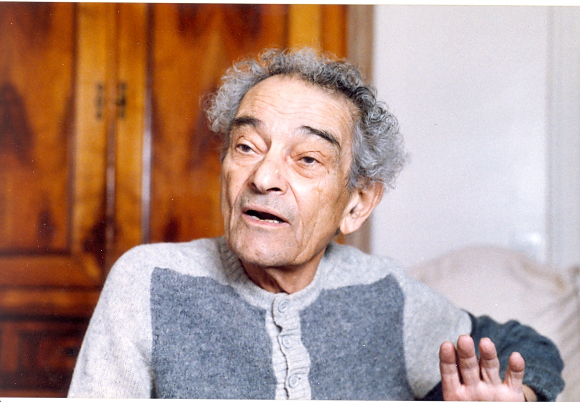 Le cinéaste Georges Rouquier en 1984